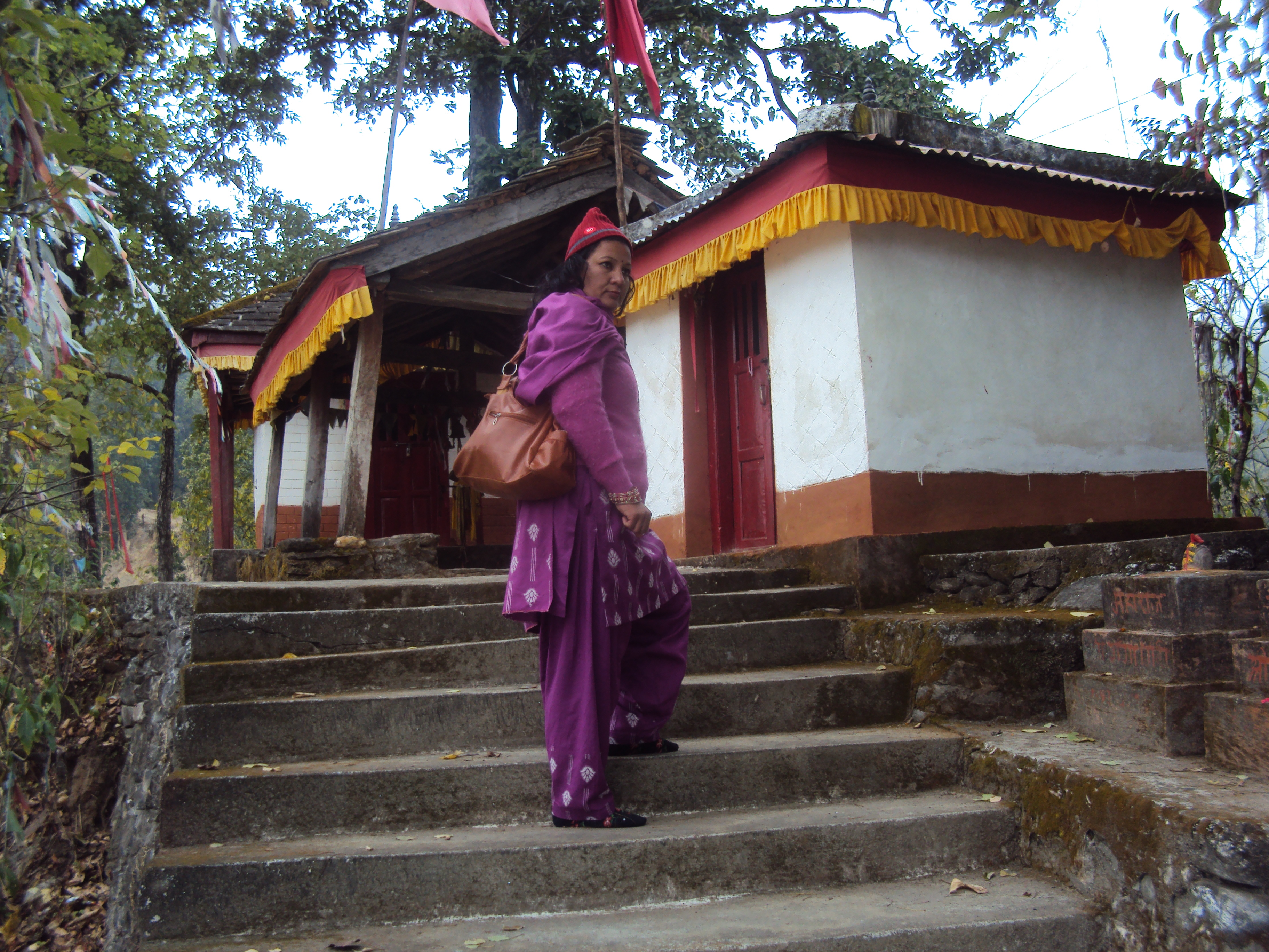 नेपाली: कोटिलास्थान मन्दिर